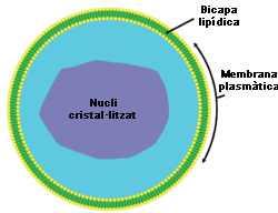 Estructura d'un peroxisoma.